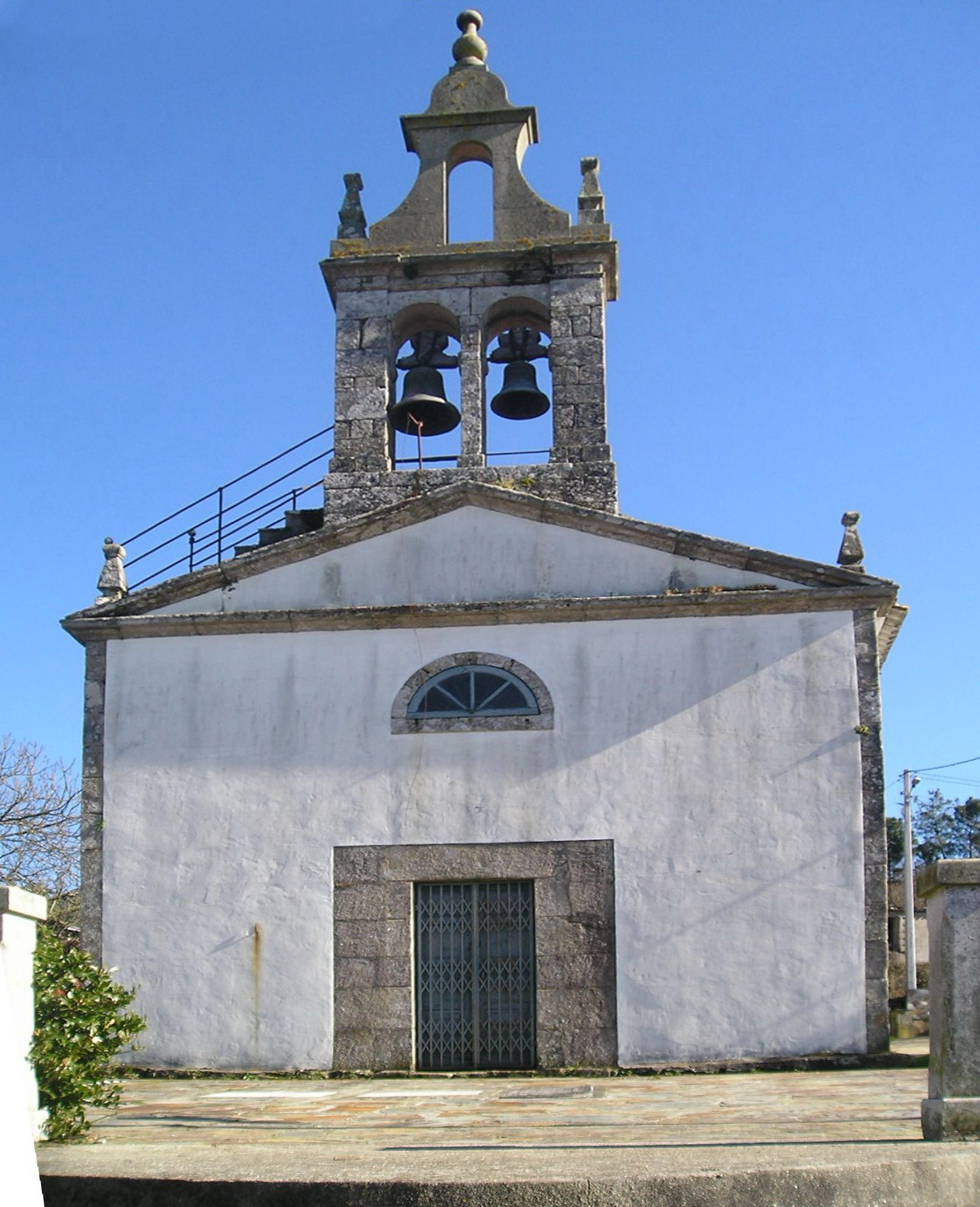 Igrexa de Santa Mariña. Boqueixón, Galicia Upload by: User:Lmbuga